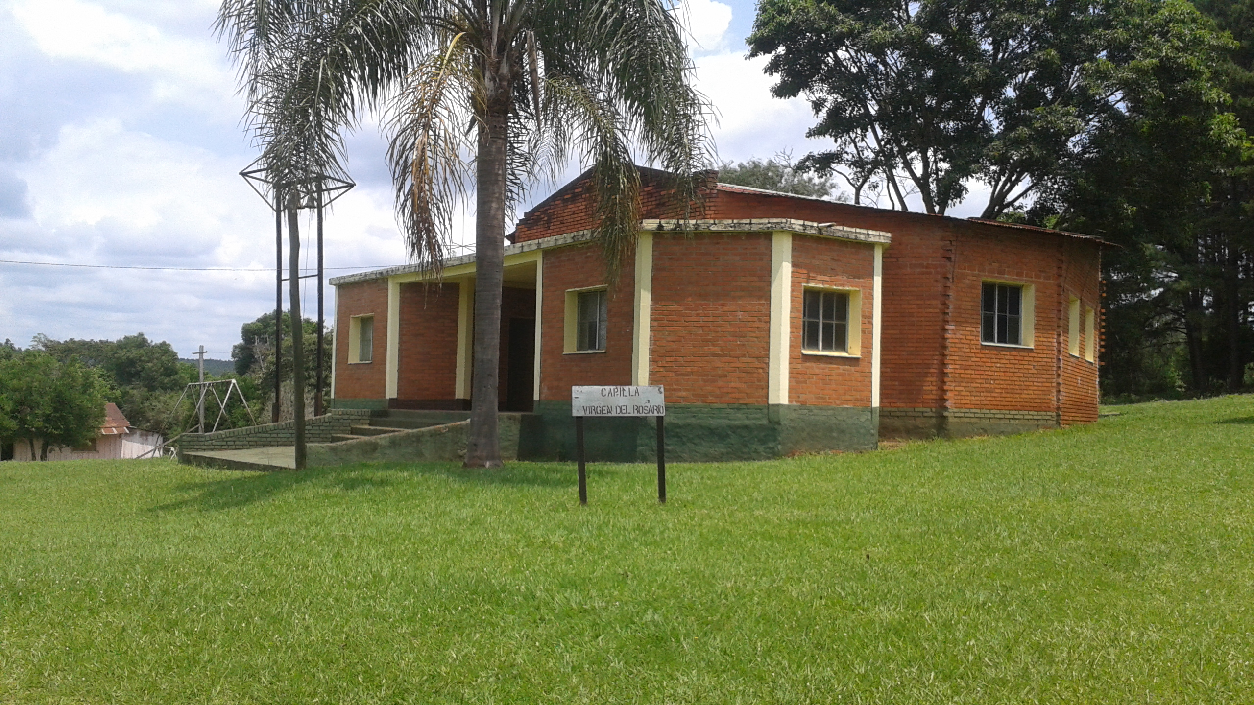 Capilla Virgen del Rosario en Puerto Mineral (Provincia de Misiones, Argentina). Fuenteː Periodista Horacio Cambeiro.